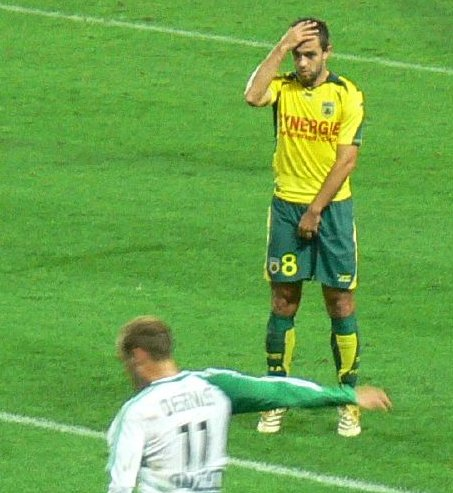 Picture of Frédéric Da Rocha.